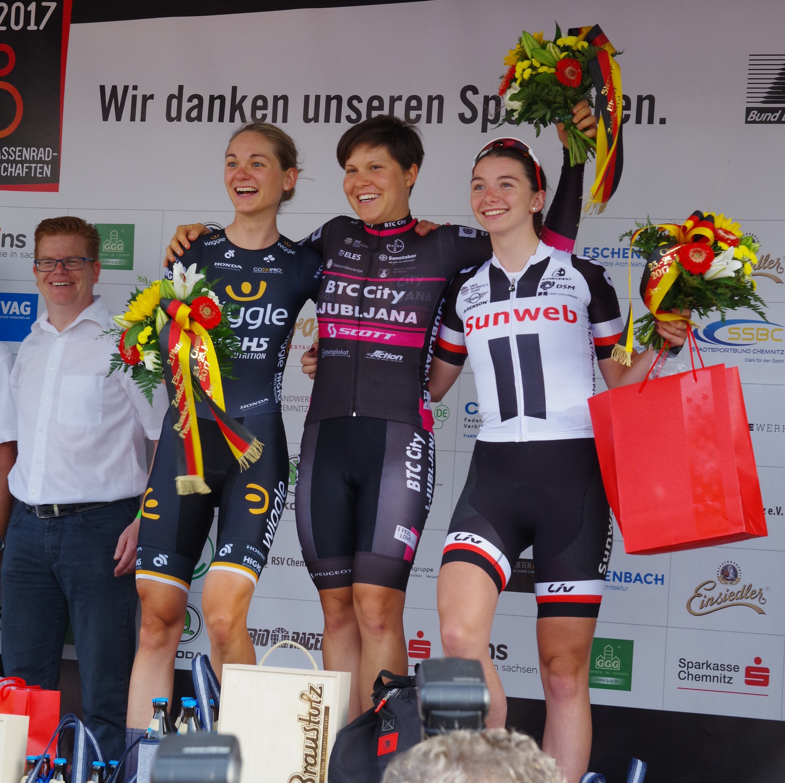 Deutsche Meisterschaften im Einzelzeitfahren 2017 23. Juni 2017 Siegerehrung Siegerehrung Lila Logistik Rad Bundesliga Platz 1: Corinna Lechner Platz 2: Claudia Lichtenberg Platz 3: Liane Lippert The making of this document was supported by the Community-Budget of Wikimedia Germany.